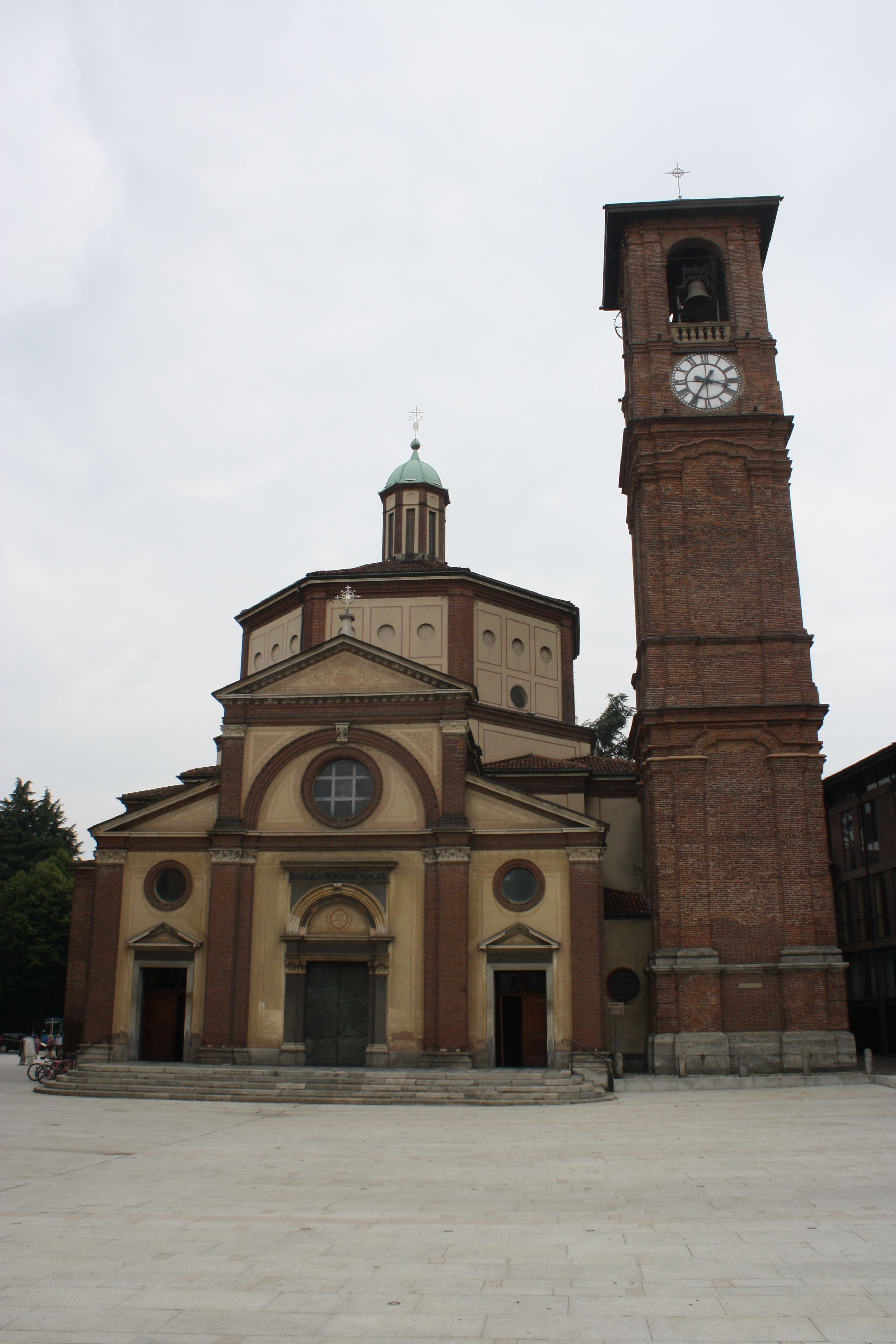 La basilica di San Magno di Legnano vista dall'omonima piazza